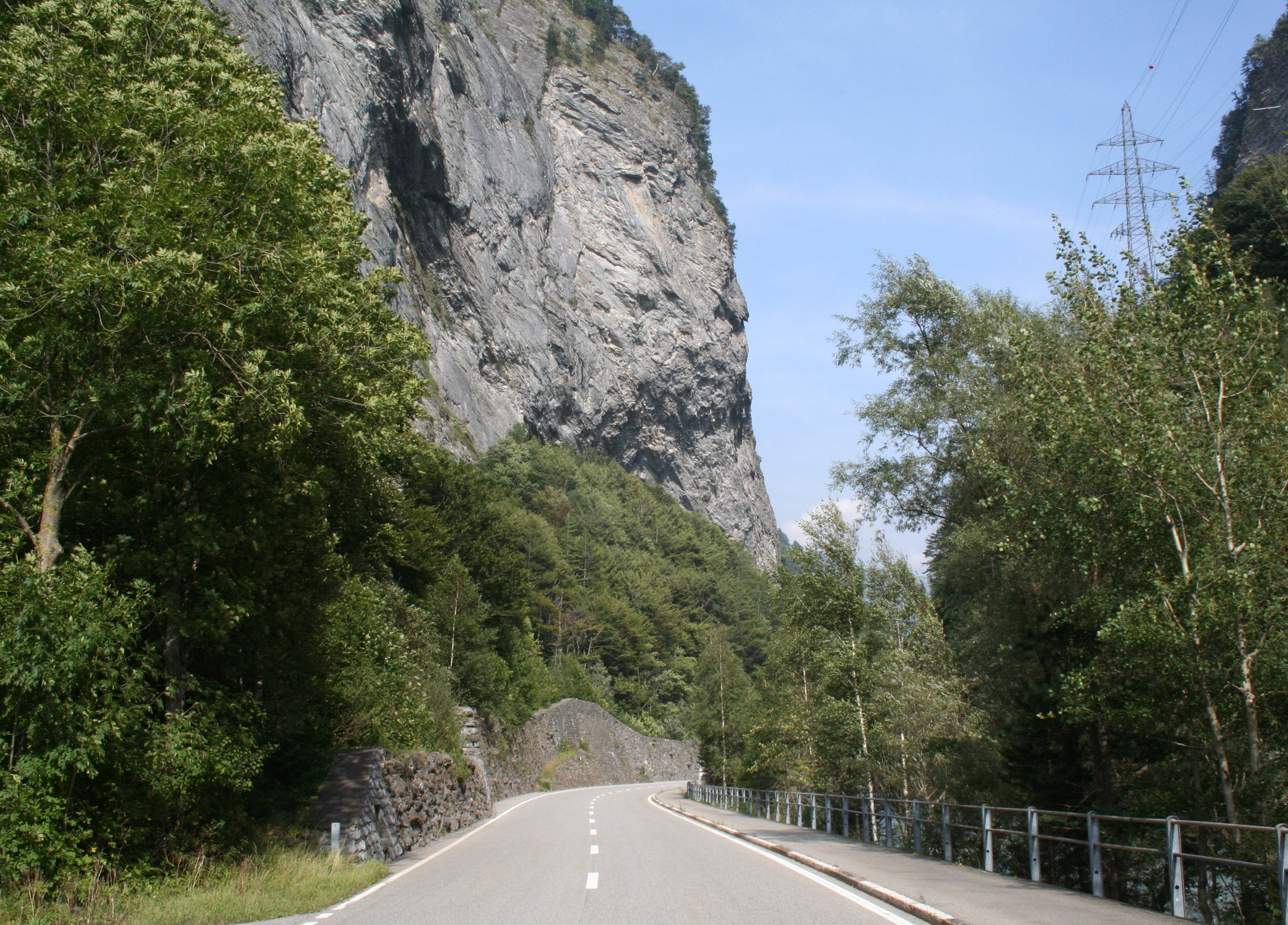 Fracstein Lage